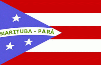 Bandeira de Marituba